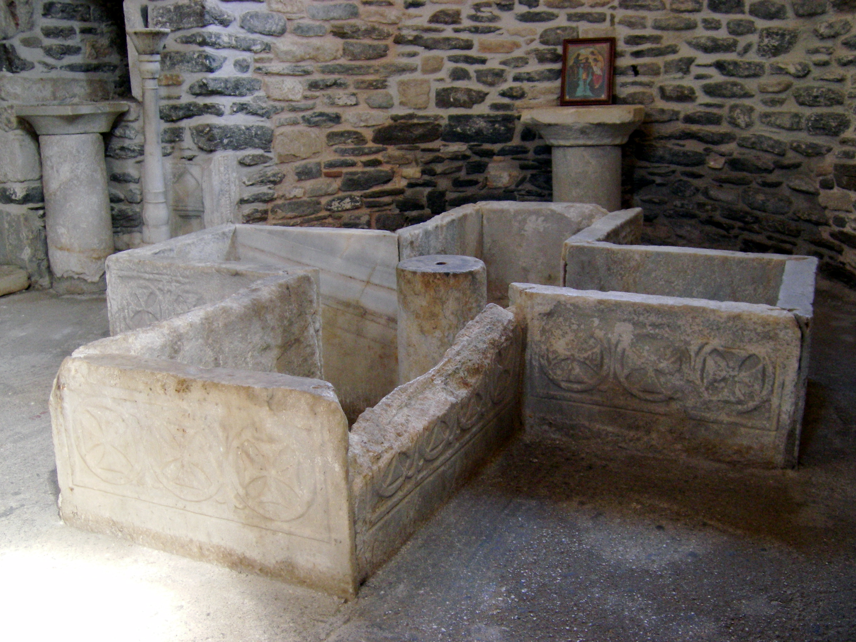 Baptistère/Baptistary Ekatontopiliani, Paros, Grèce/Greece